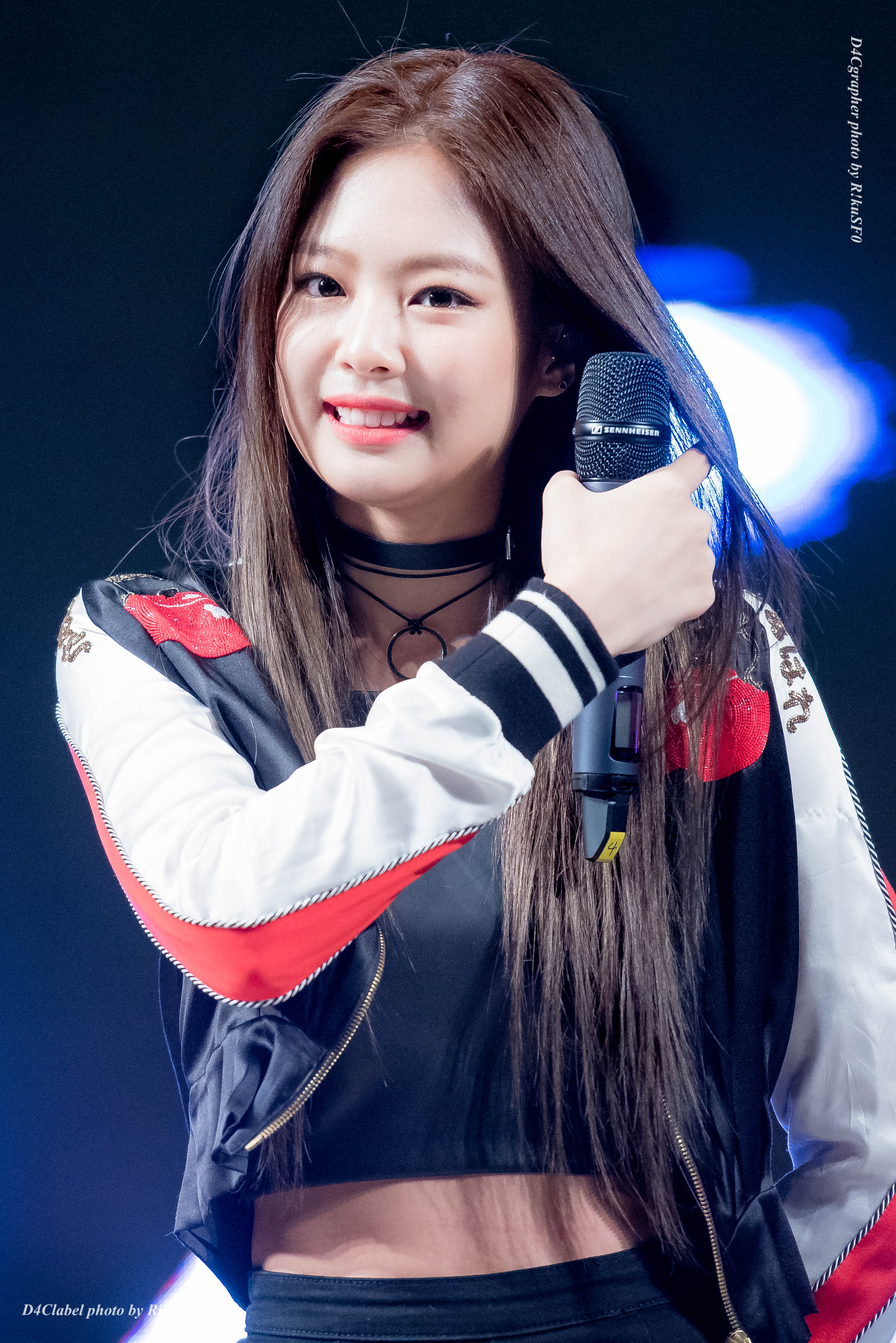 [17.05.17] 블랙핑크 제니